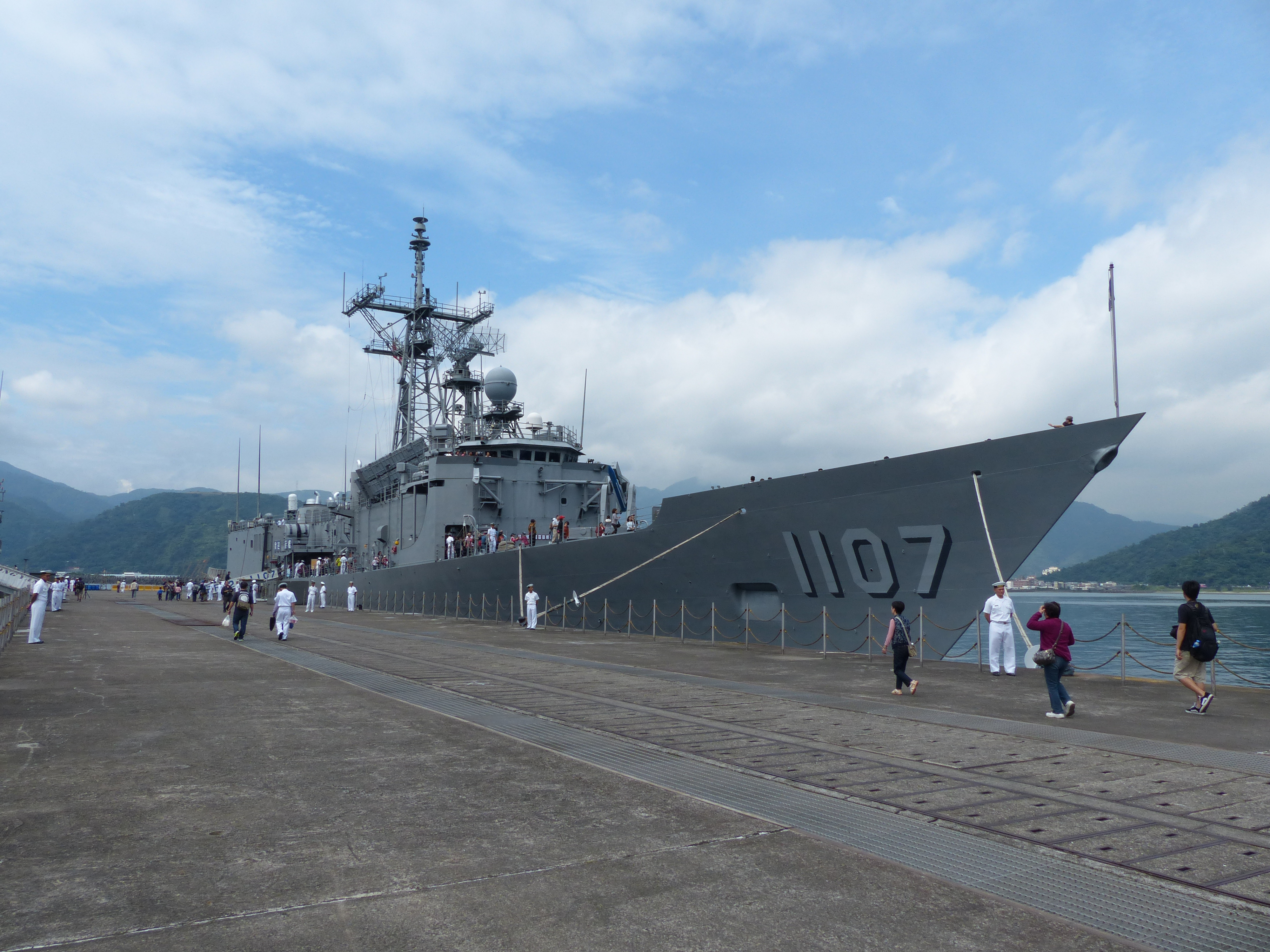 2013年中正軍港營區開放活動，停泊12號碼頭的成功級巡防艦「子儀軍艦」（PFG2-1107）。